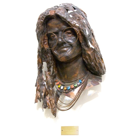 Janis Joplin portrészobor, vörösrézlemez, 62cm, készült 1990-ben, átalakítva 2013-ban. Elhelyezésre került a budapesti Erkel Ferenc Álltalános Iskola emeleti előcsarnokában 2013. Alkotó: ifjabb Szlávics László